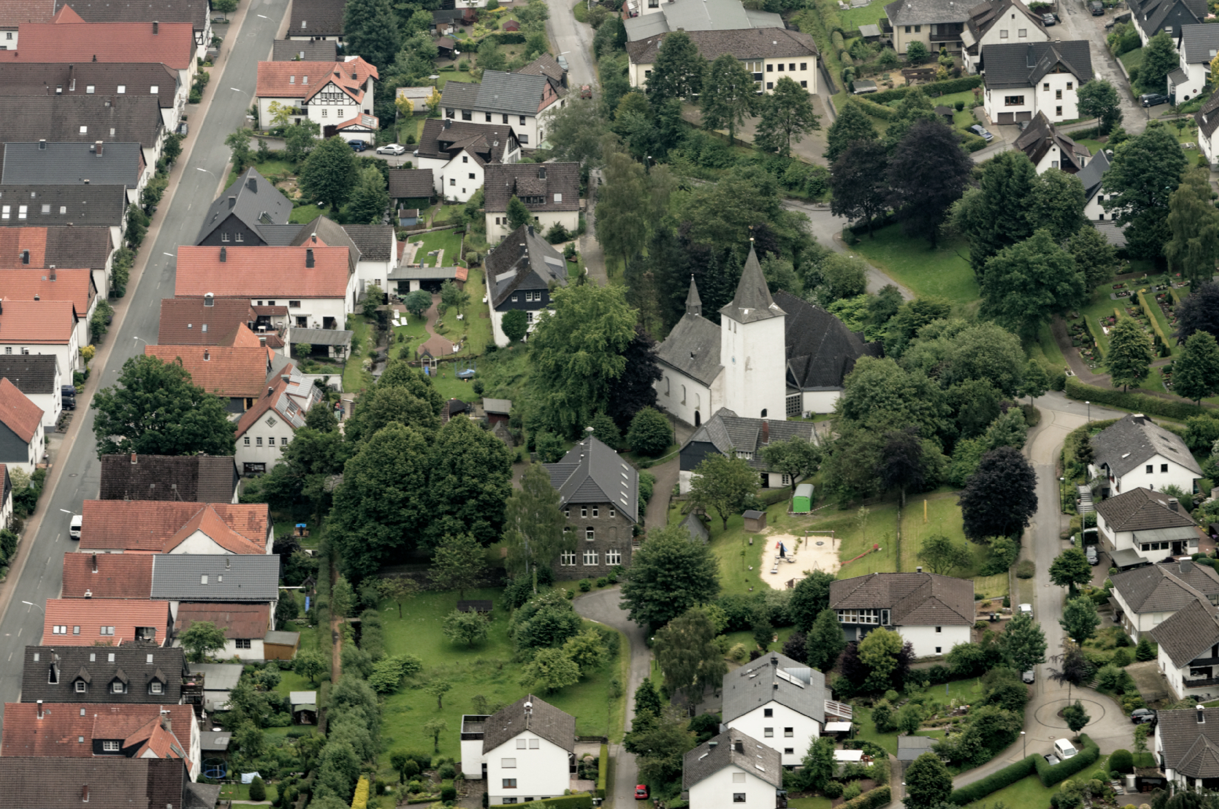 Fotoflug Sauerland Nord. Sundern (Sauerland)-Hagen mit Kirche St. Nikolaus The making of this document was supported by the Community-Budget of Wikimedia Germany.